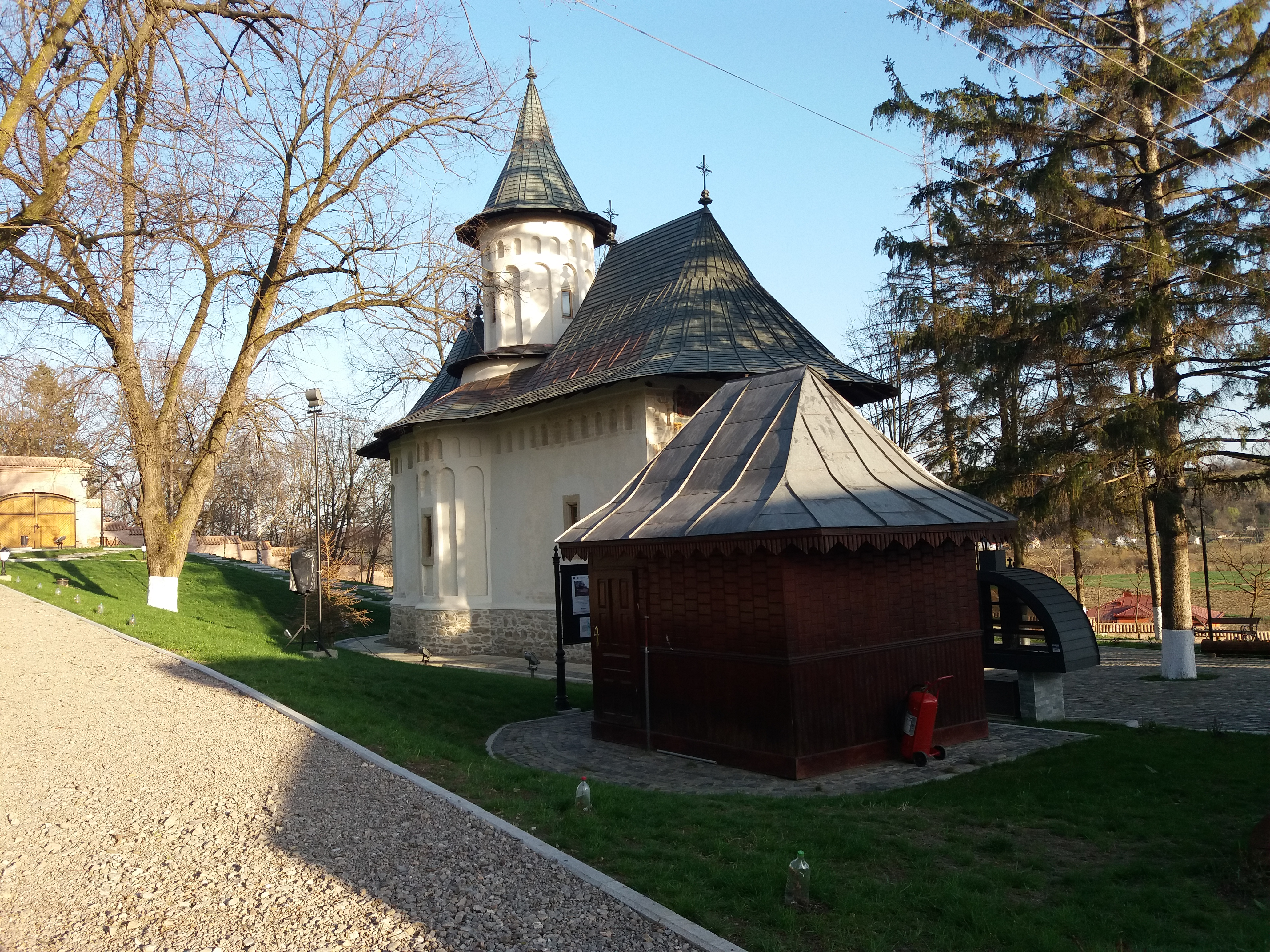 Mănăstirea Coșula este o mănăstire de călugări amplasată în satul Coșula (din județul Botoșani), la o distanță de 20 kilometri sud-est de orașul Botoșani. Pe aici se ajunge mergând 3 km pe un drum județean aflat la dreapta DN 28 B. Mănăstirea Coșula datează din anul 1535, când marele vistiernic Mateiaș a construit aici un complex monahal.